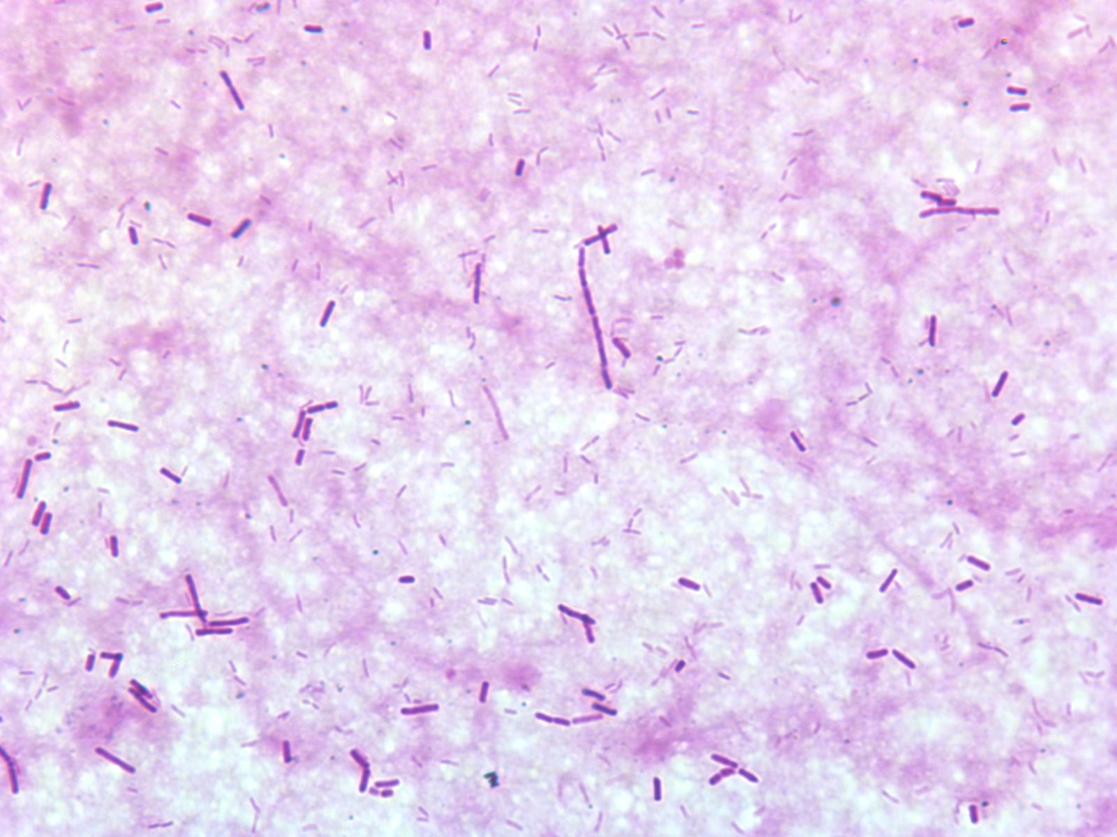 gram stained Clostridium perfringens